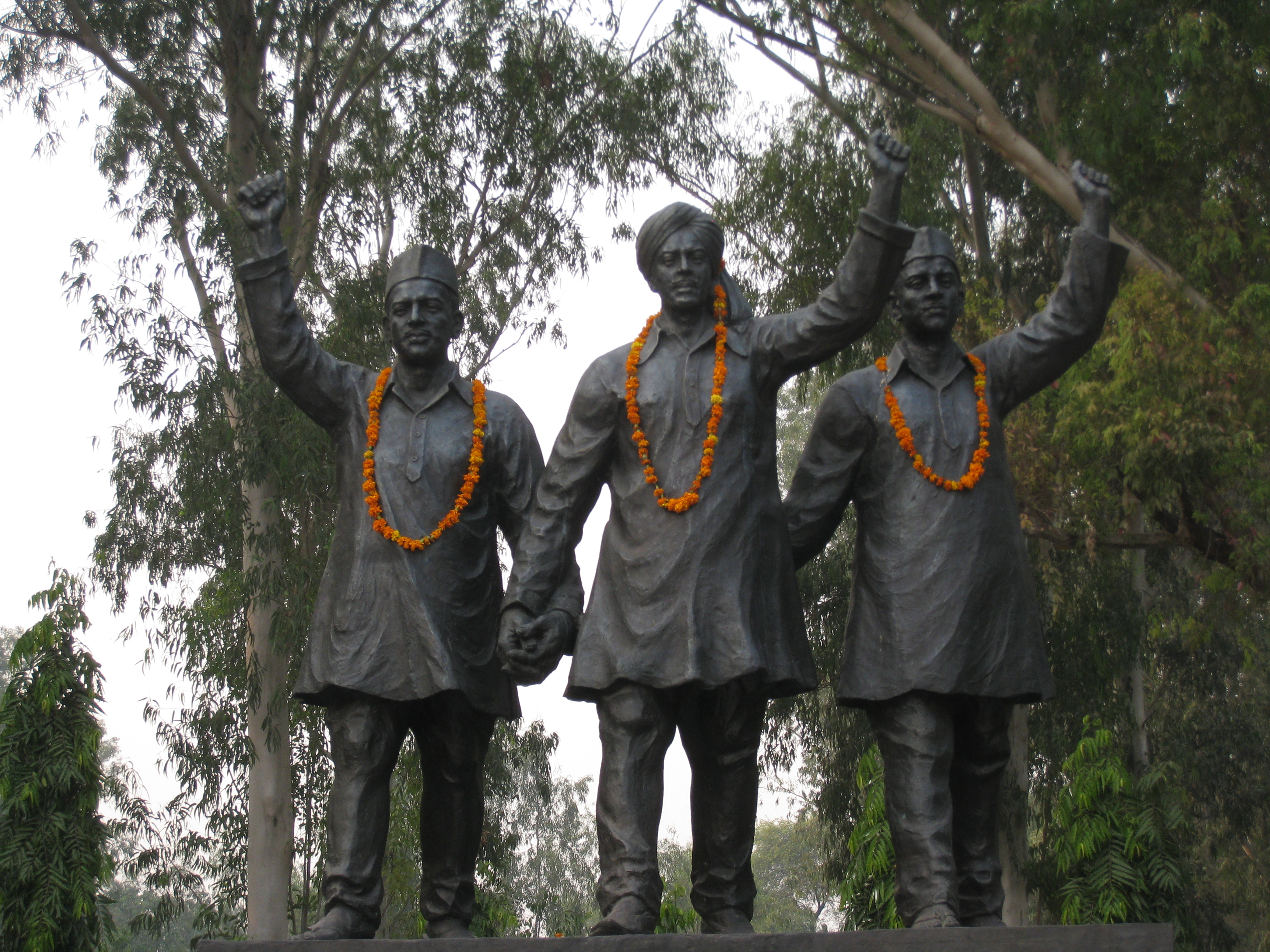 India/Pakistan Border, near Amritsar